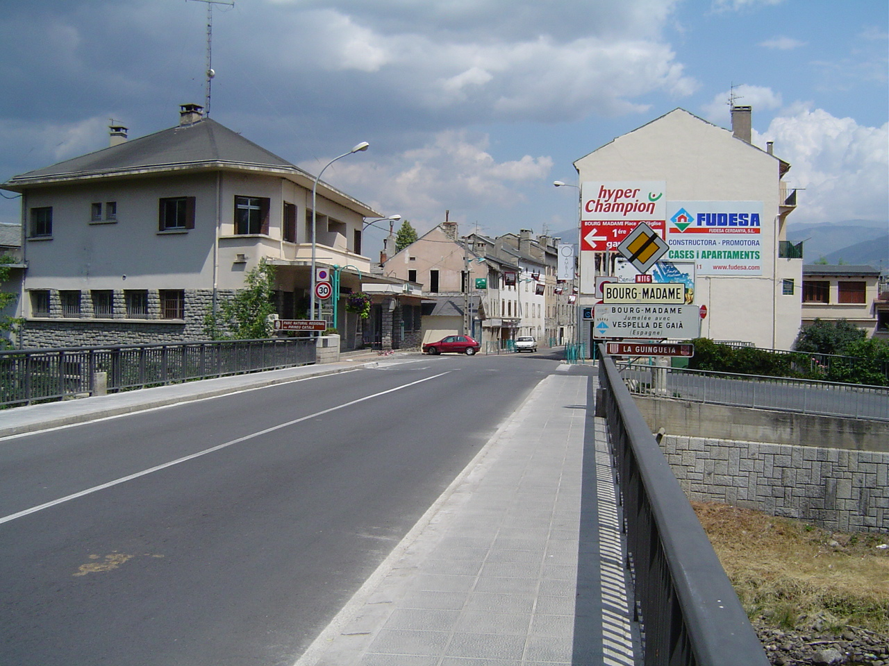 Grens overgang Puigcerda (E) en Bourg Madame (FR)